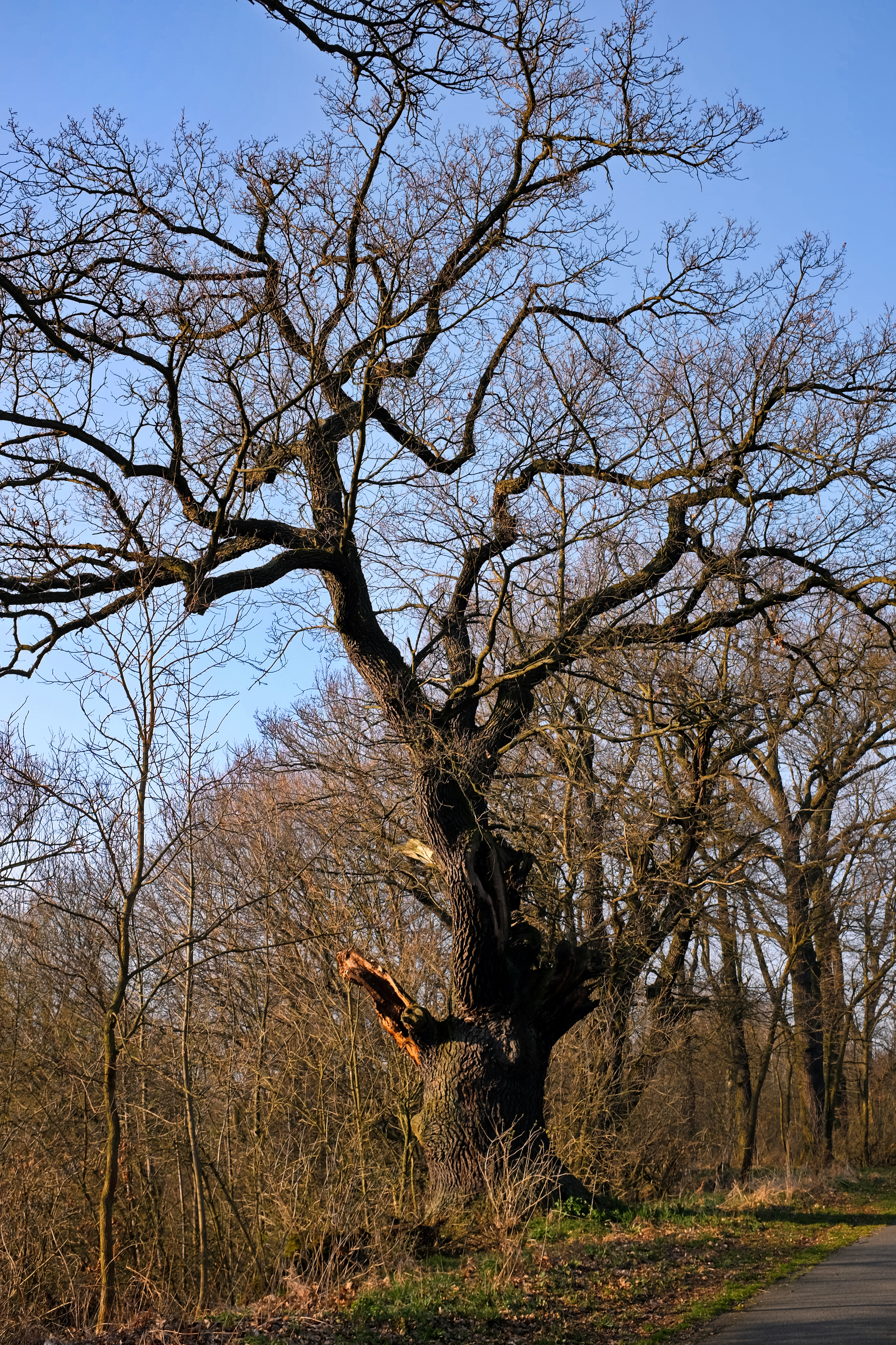 Památný strom - Mostovský dub - Mostov, část obce Odrava, okres Cheb